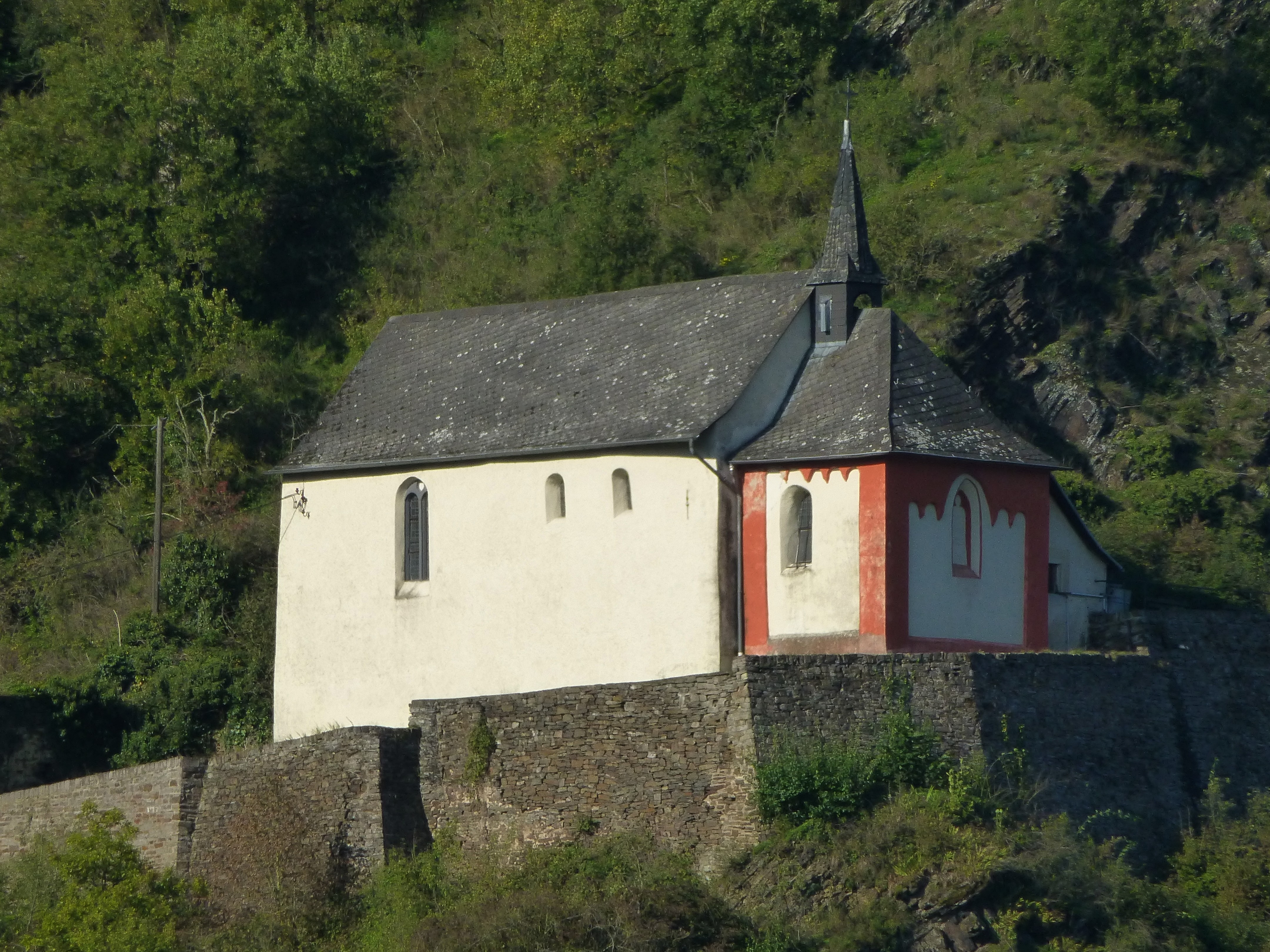 Burgen an der Mosel - Pauluskapelle